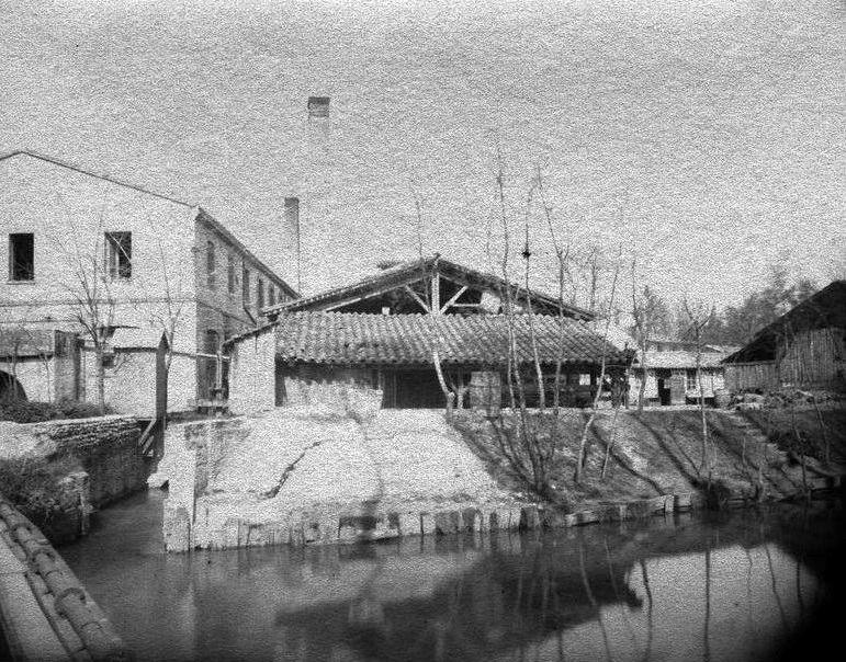 Papeterie sur l'île du Ramier. Mars 1881. Vue d'ensemble des bâtiments de la papeterie. Au premier plan canal ; au second plan quatre bâtiments, avec cheminées ; en arrière plan arbres.